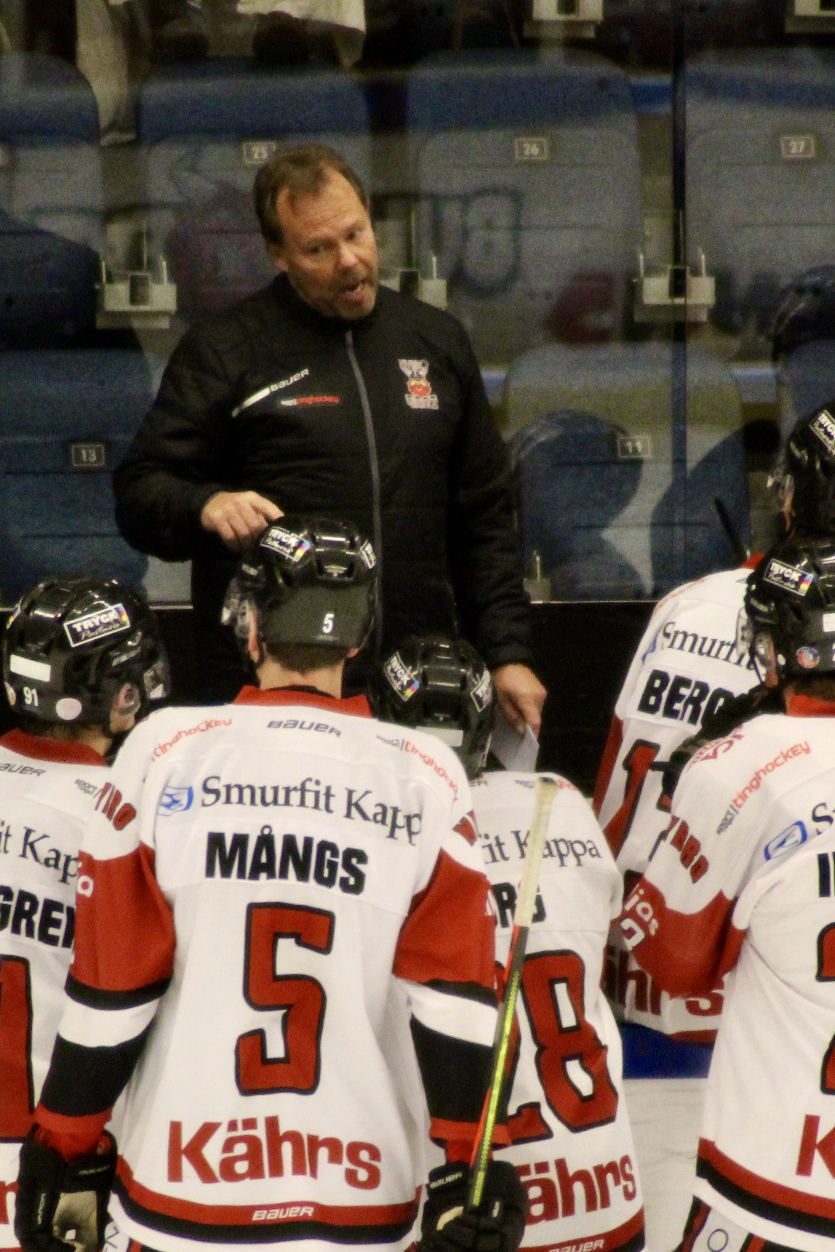 Mikael Tisell i tränarbåset för Nybro Vikings under en match i Borås Arena mot Borås HC. 2019-11-06.